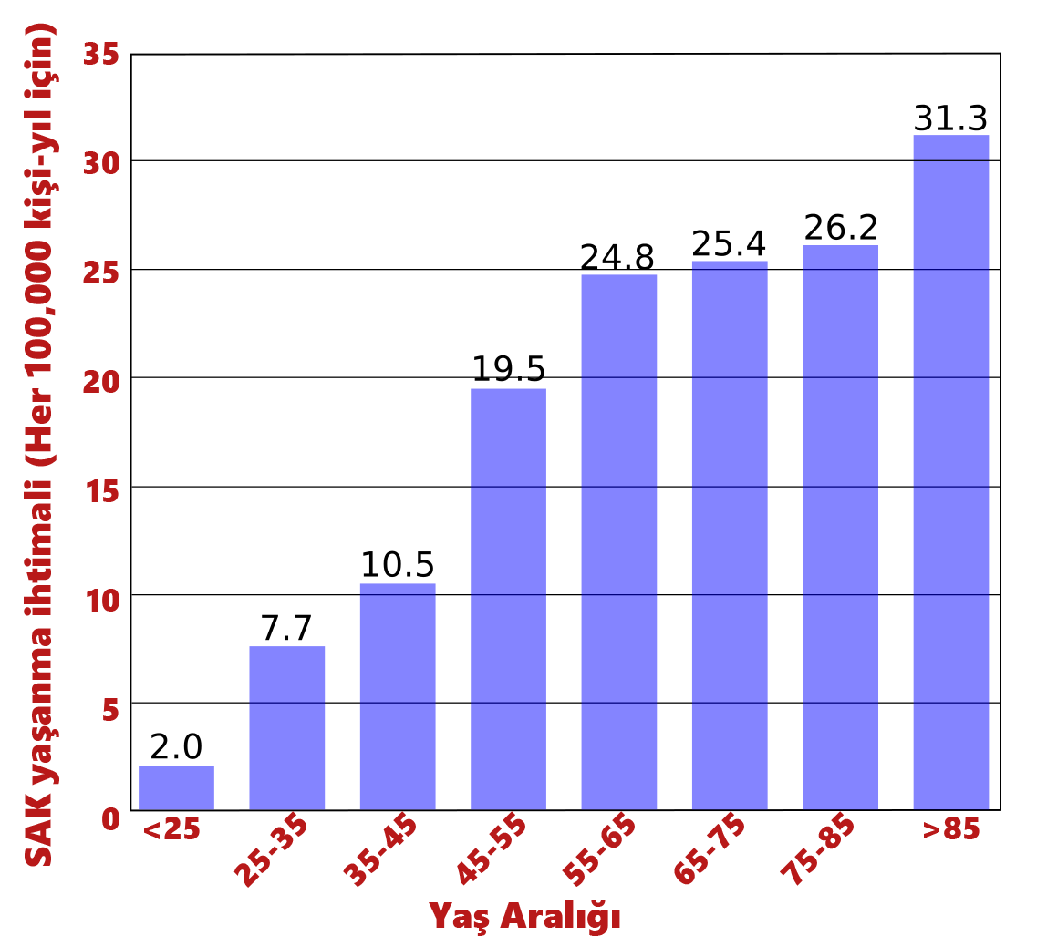 SAK yaşanma ihtimali (Her 100,000 kişi-yıl için) yaş grubuna göre grafik